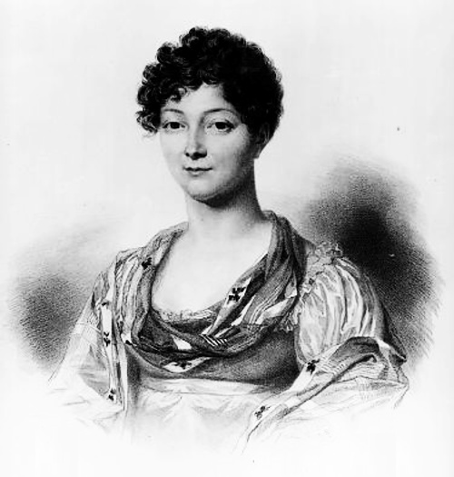 Portrait de Victorine de Chastenay tiré des Mémoires de Mme de Chastenay, 1771-1815.